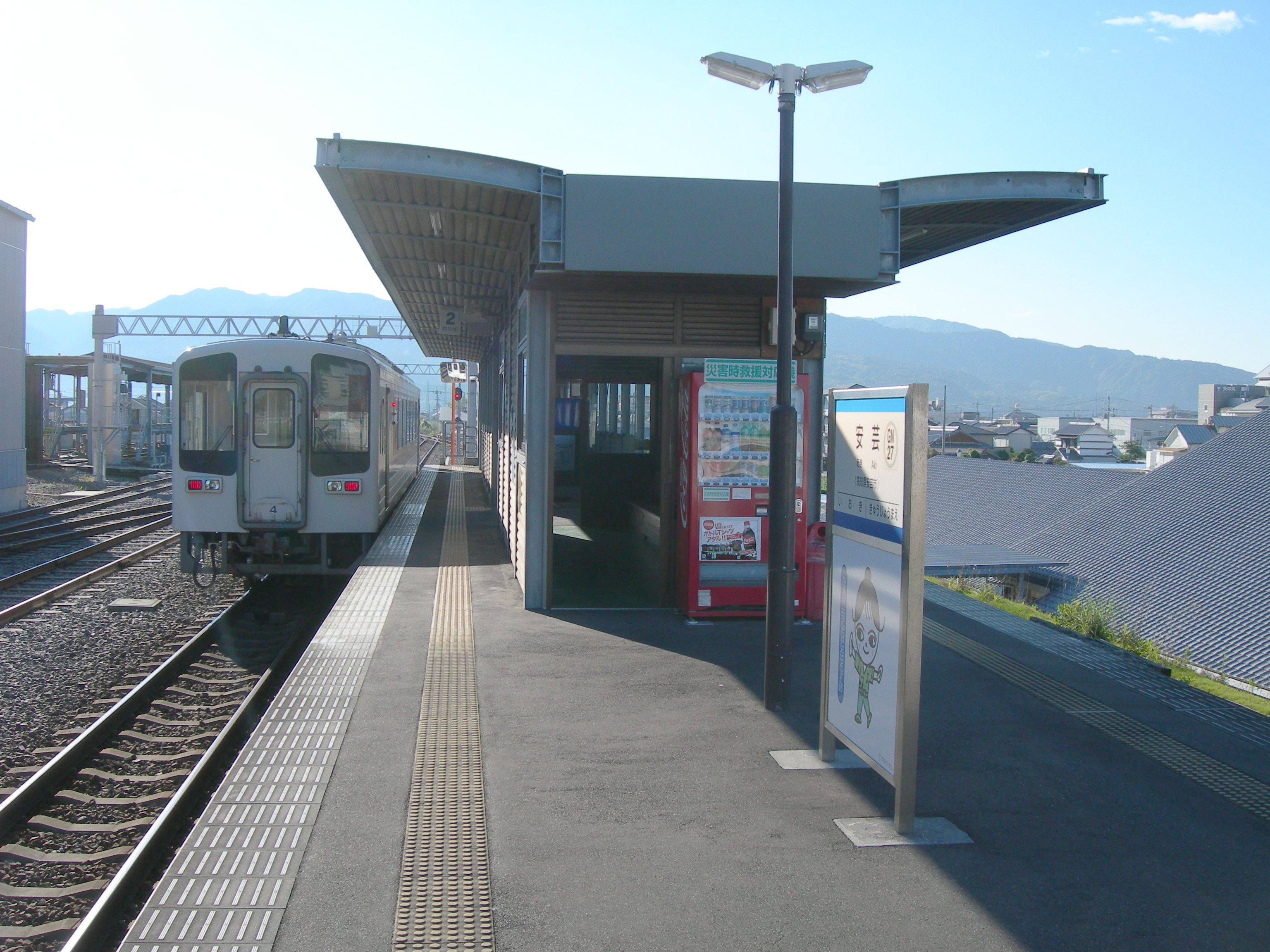 安芸駅ホーム